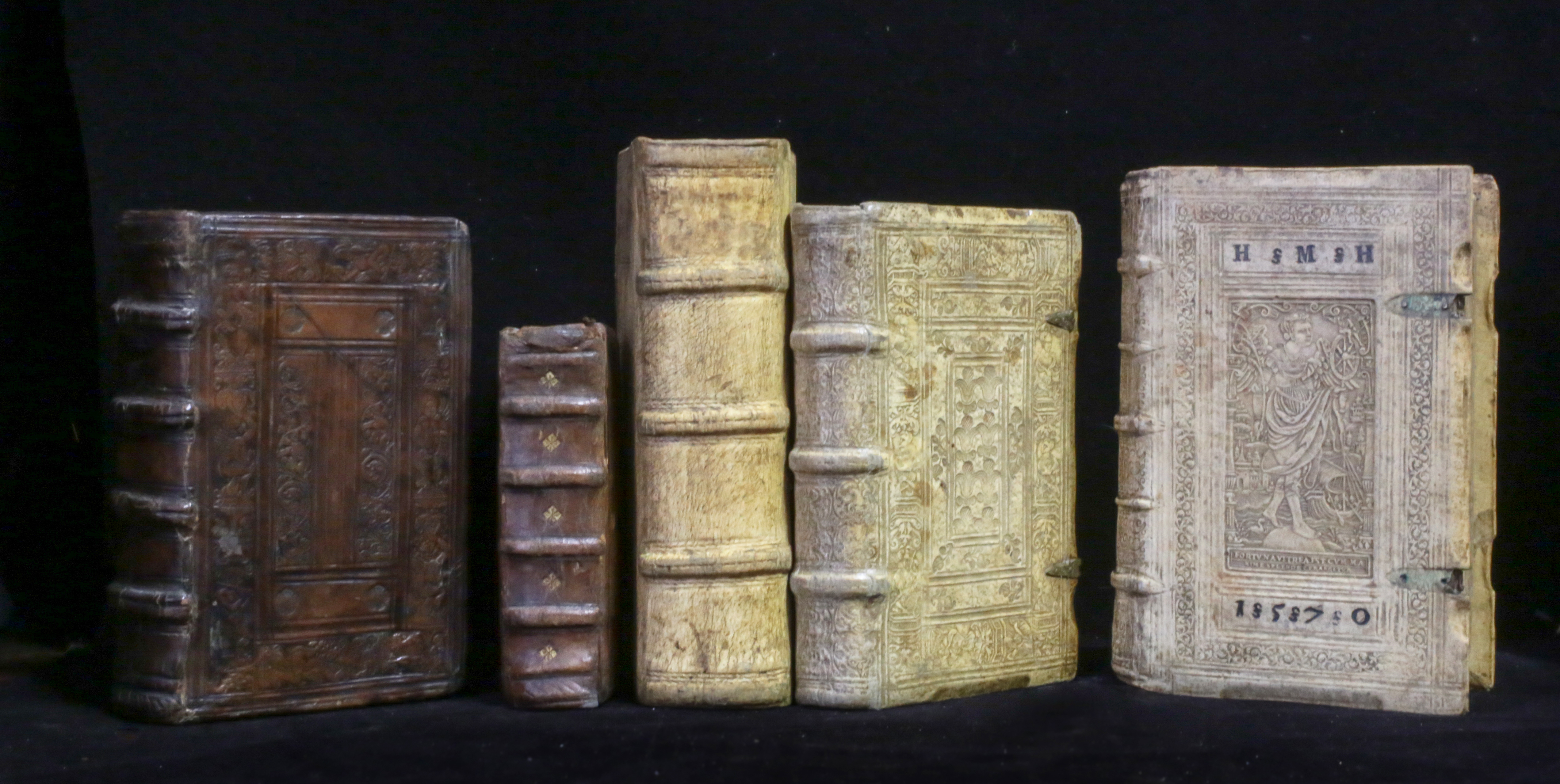 Livres anciens - Reliures XVIè Renaissance